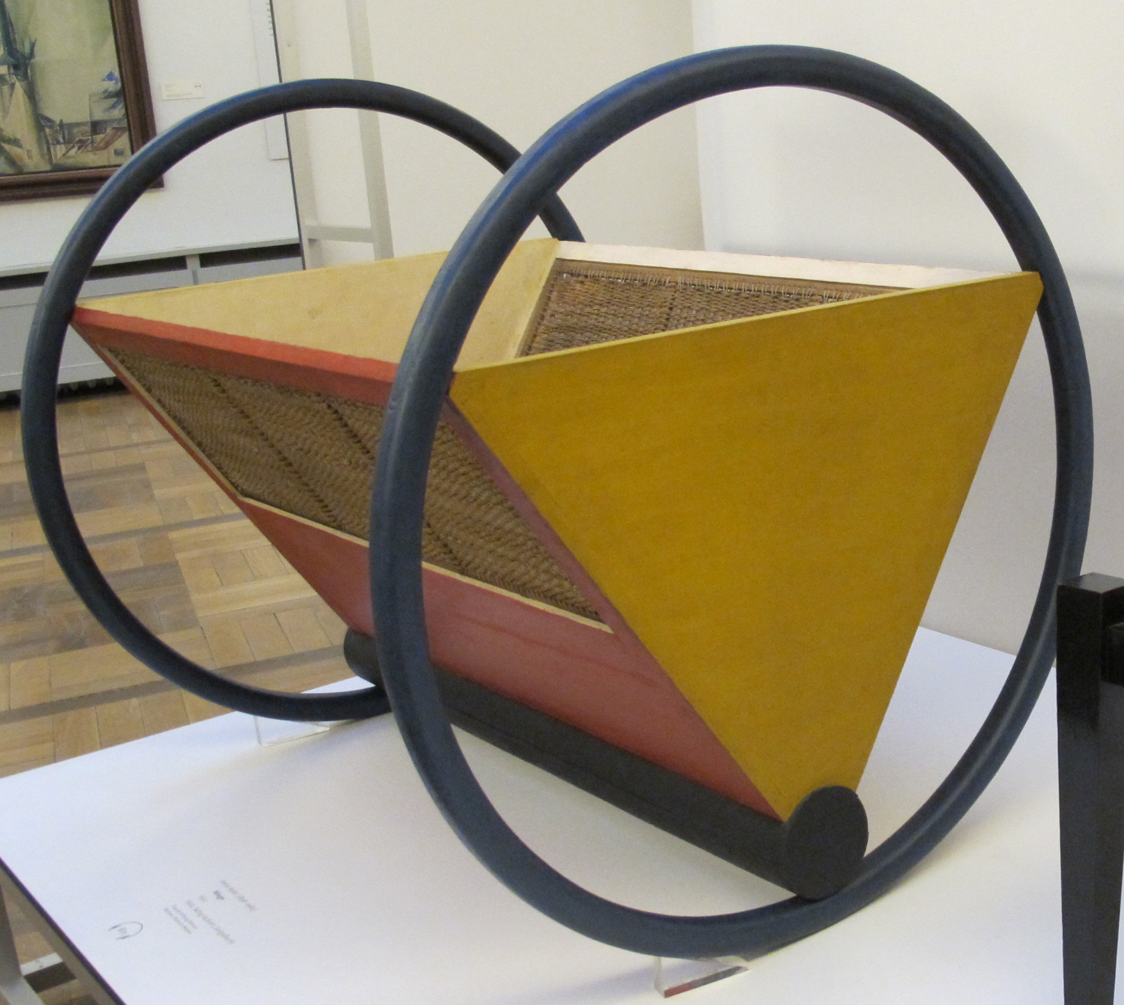 Peter Keler (German, 1898-1982): Querschwingende Wiege, 1922